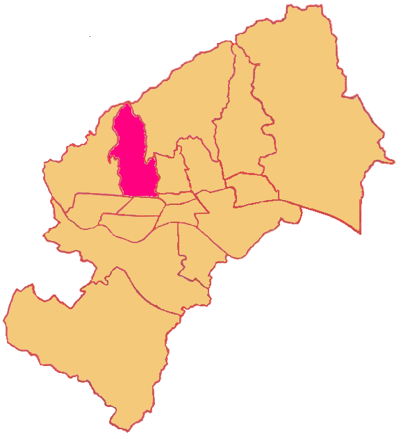 Map of Črnomerec District in Zagreb (Gradska četvrt Črnomerec)